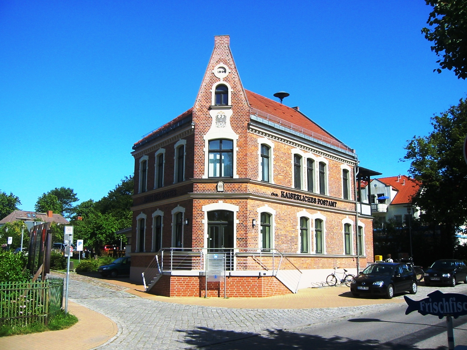 Touristeninformation im ehemaligen Postamt von Wustrow (Fischland)